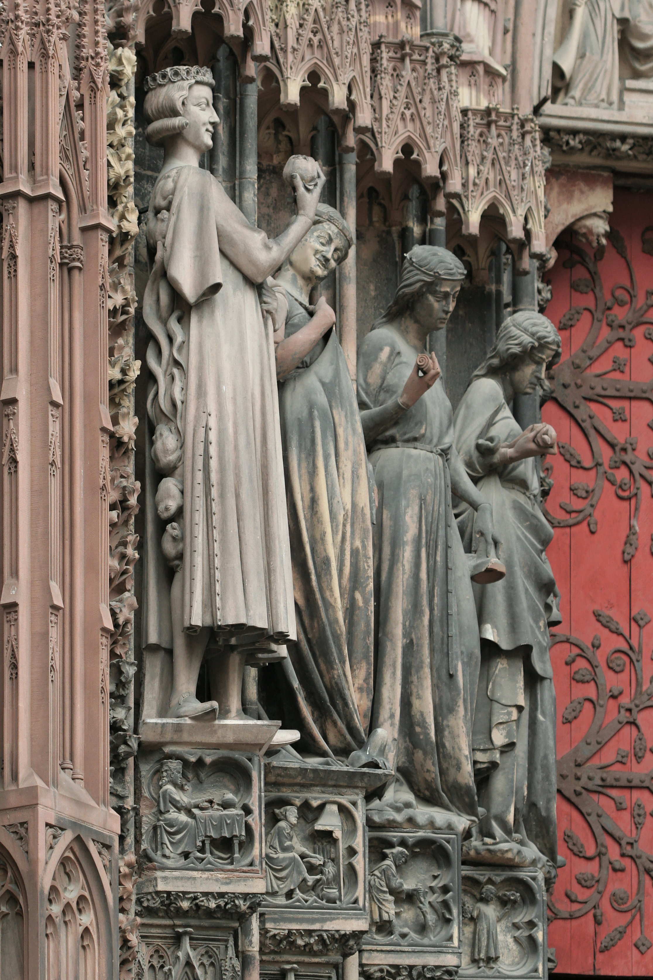 Strasbourg, portail sud de la cathédrale. Le tentateur (il tient la pomme de la tentation, son dos est dévoré par des crapauds et des reptiles) et les vierges folles (elles tiennent les lampes retournées, serrent fermées les tables de la loi).